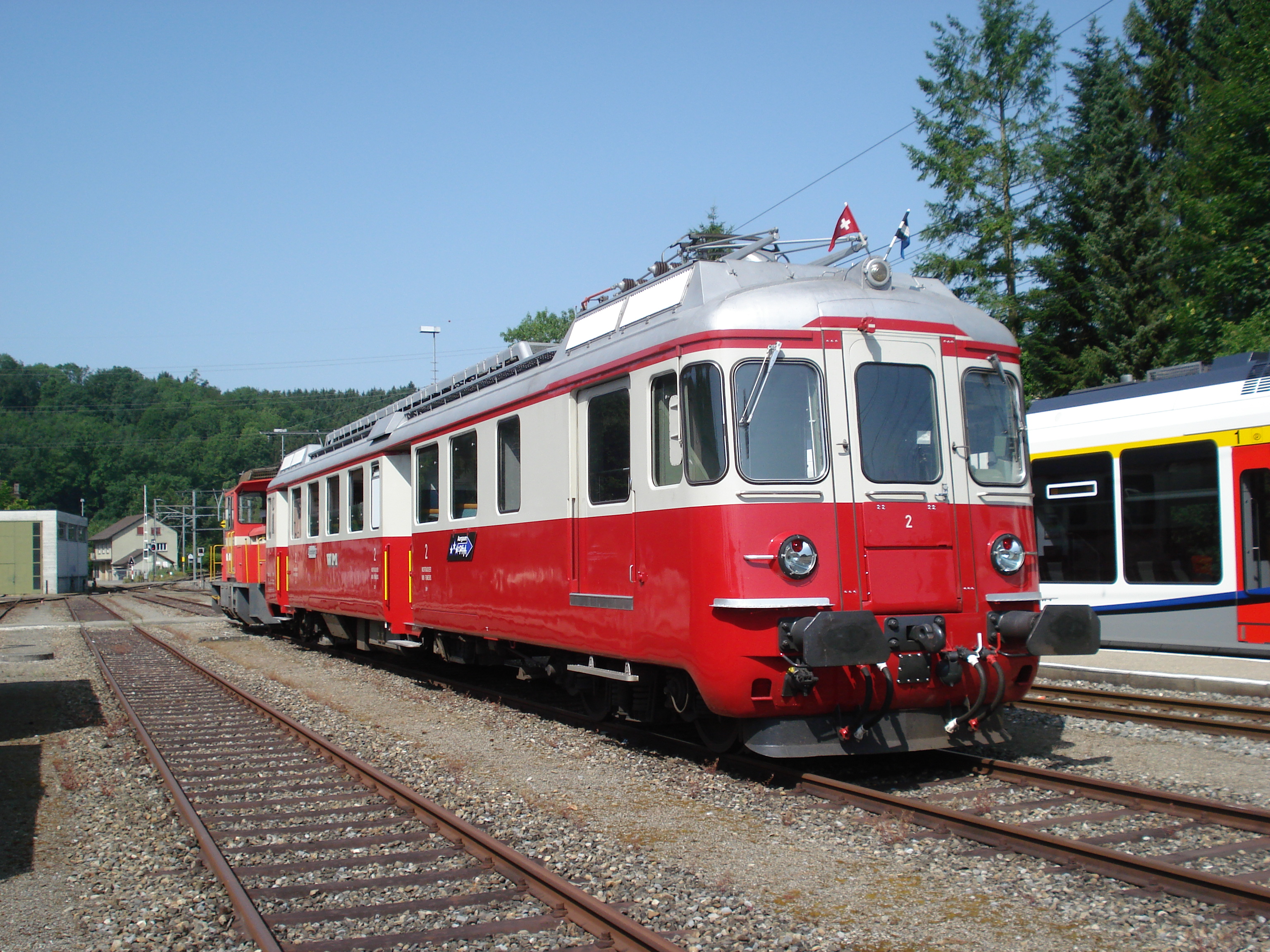 BDe 4/4 2 der ehemaligen Wohlen–Meisterschwanden-Bahn (WM), heute im Einsatz beim Verein Depot und Schienenfahrzeuge Koblenz (DSF) in der Schweiz.